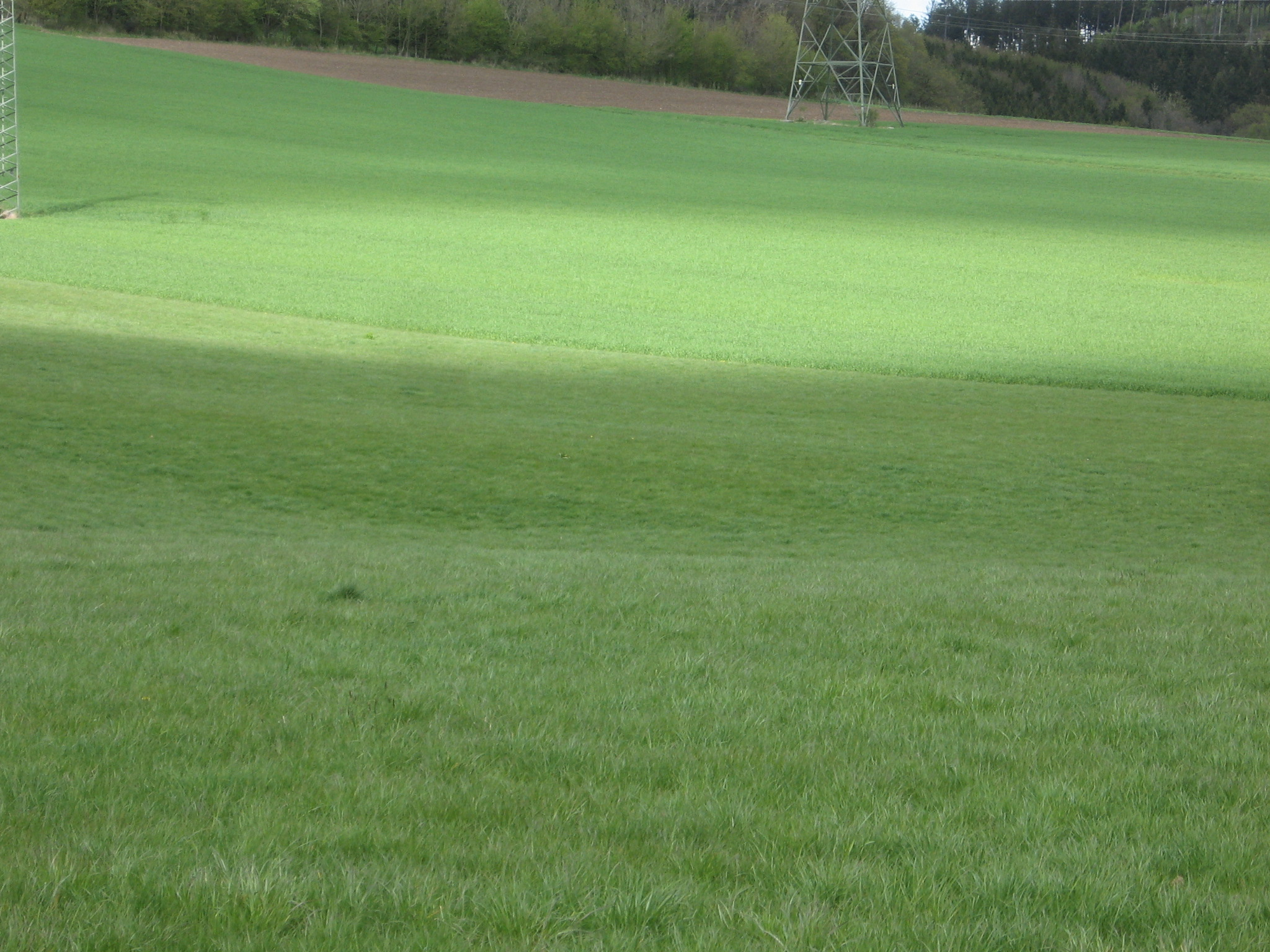 Das Naturdenkmal Doline Schwelgenkamp befindet sich in der Bildmitte und ist umgeben vom Landschaftsschutzgebiet Wintertal / Escherfeld. Es ist nur noch als eine Kuhle in der Landschaft wahrnehmbar.